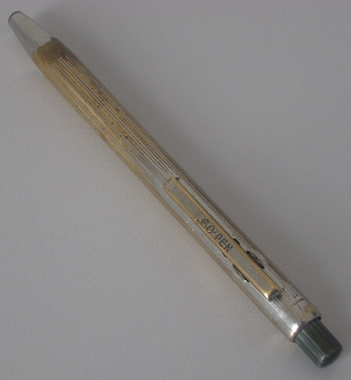 "GO"PEN golyóstoll